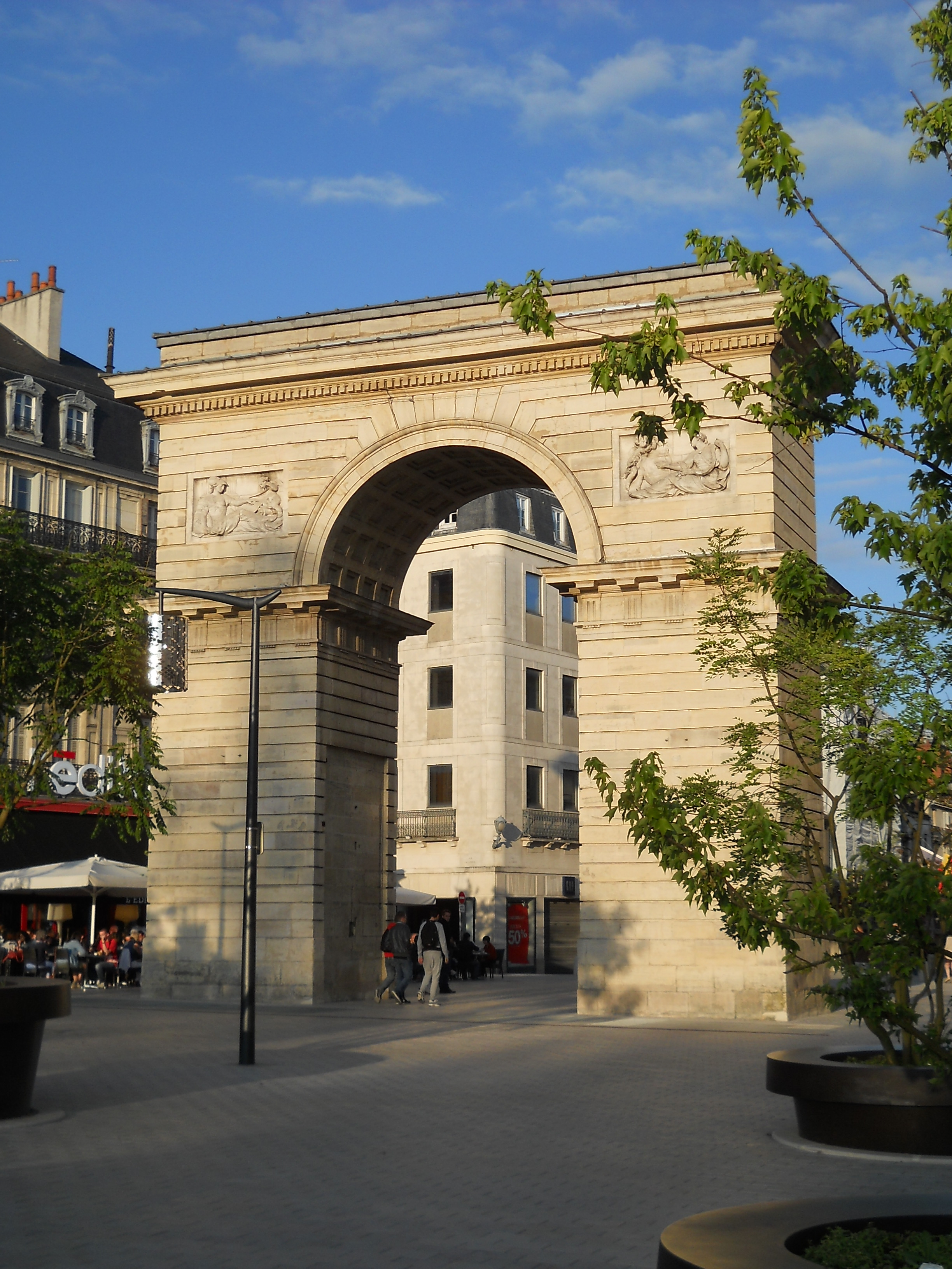 Porte Guillaume (Classé), Dijon, Côte-d'Or, France .